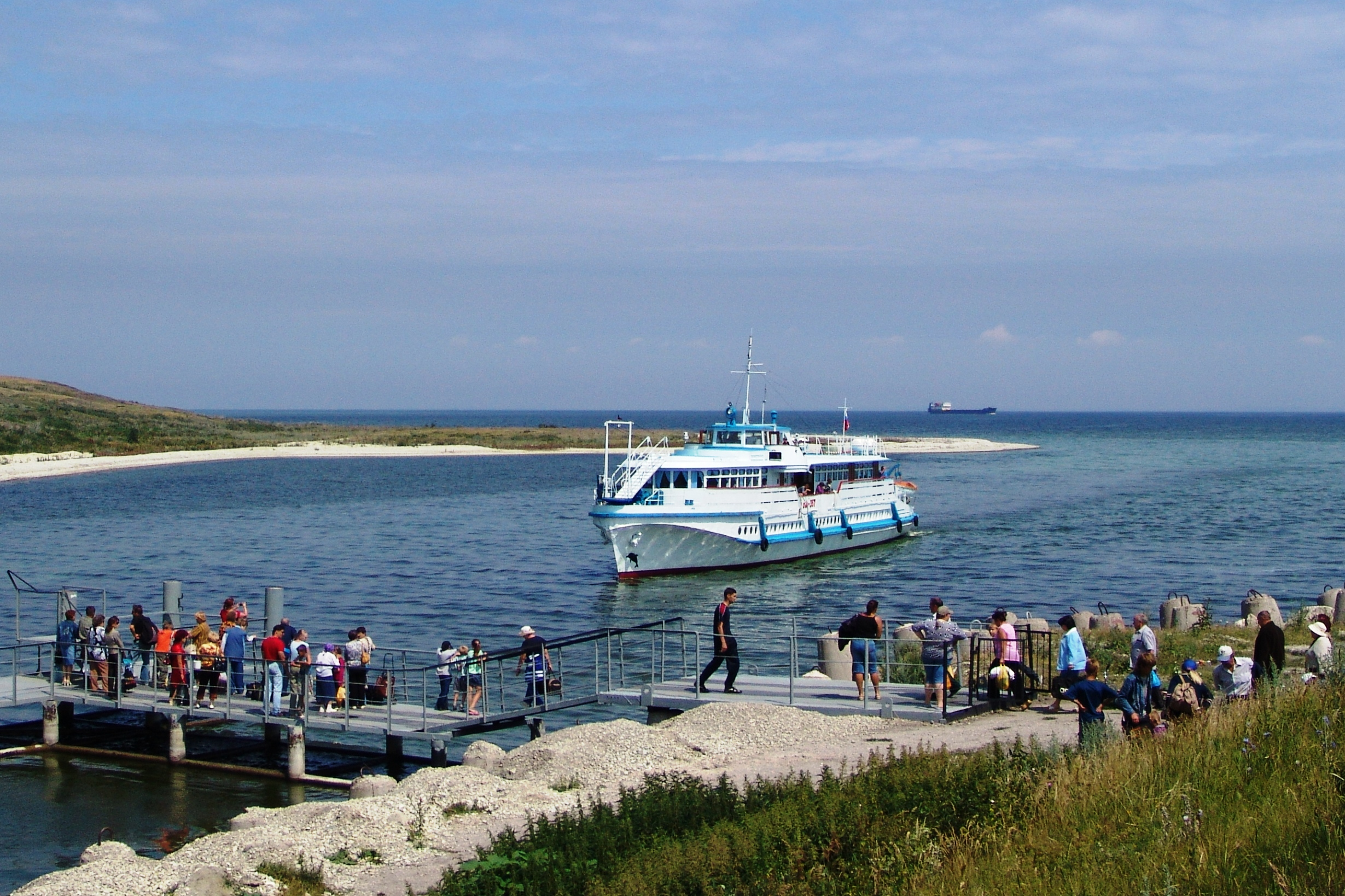 Новодевичье, Причал.